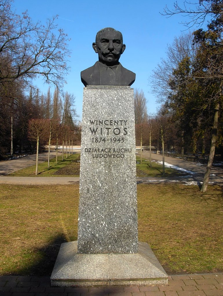 Popiersie Wincentego Witosa w Bydgoszczy